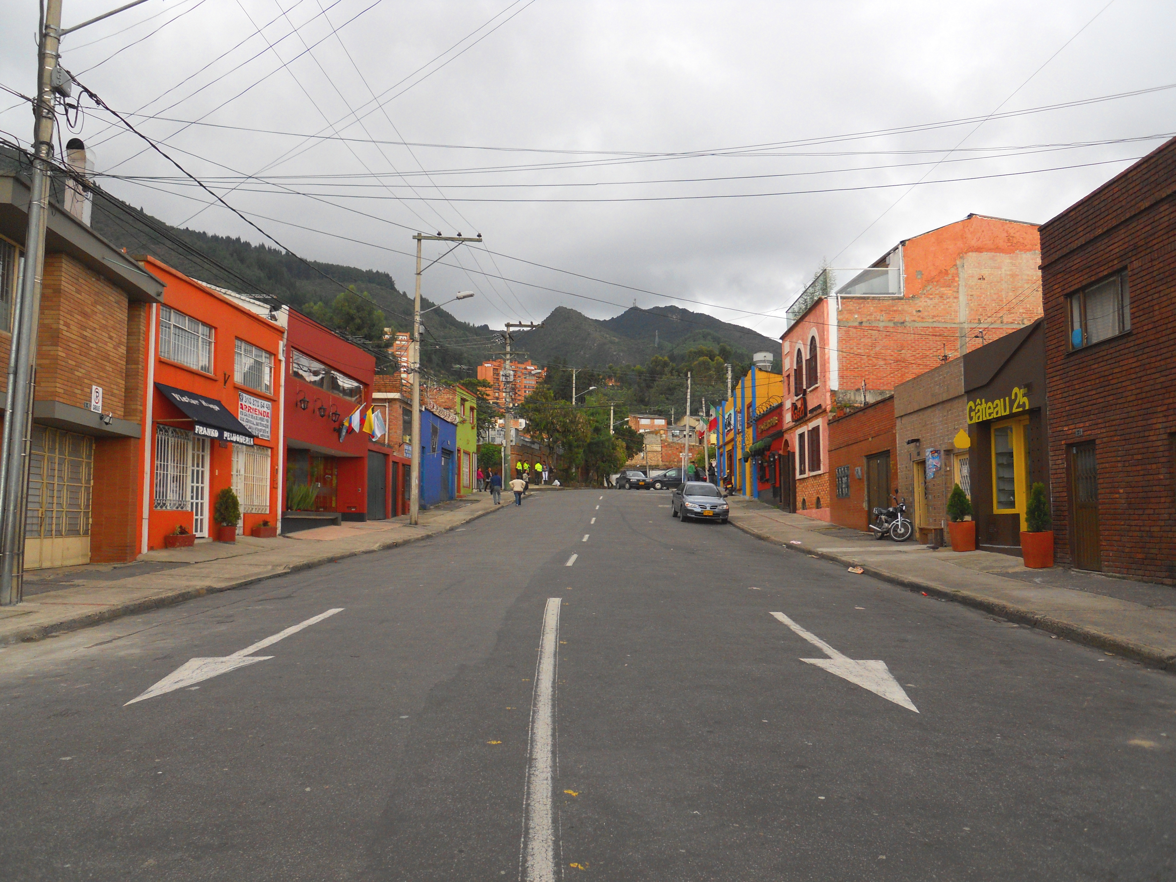 Calle 120 A con carrera Sexta Bogotá localidad de Usaquén.